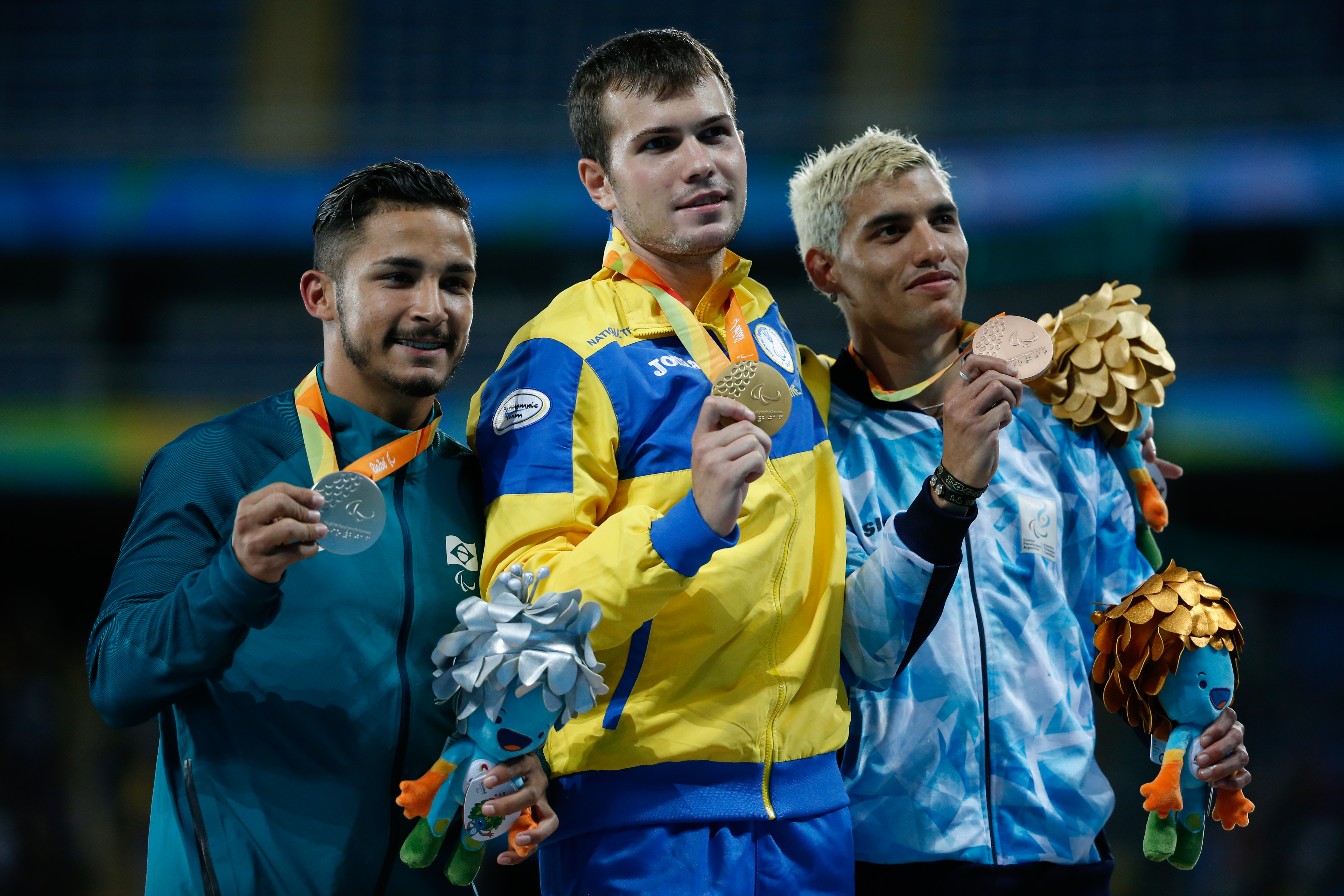 Rio de Janeiro - Brasileiro Fabio da Silva Bordignon leva medalha de prata nos 100m T35 nos Jogos Paralímpicos Rio 2016, no Estádio Olímpico